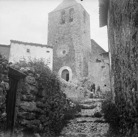 Imatge